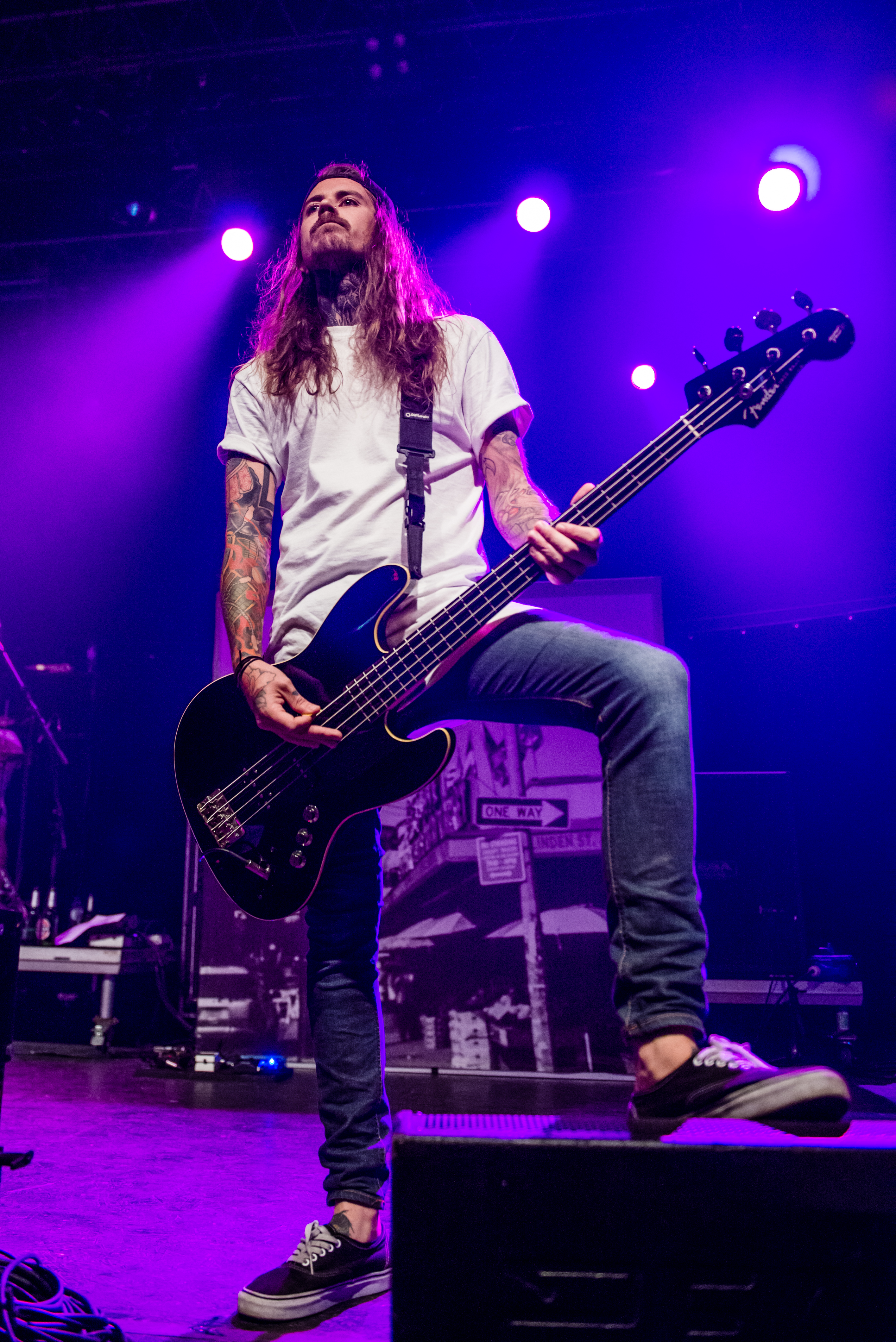 'Impericon Festival 2015; Oberhausen Turbinenhalle': 'Deez Nuts'